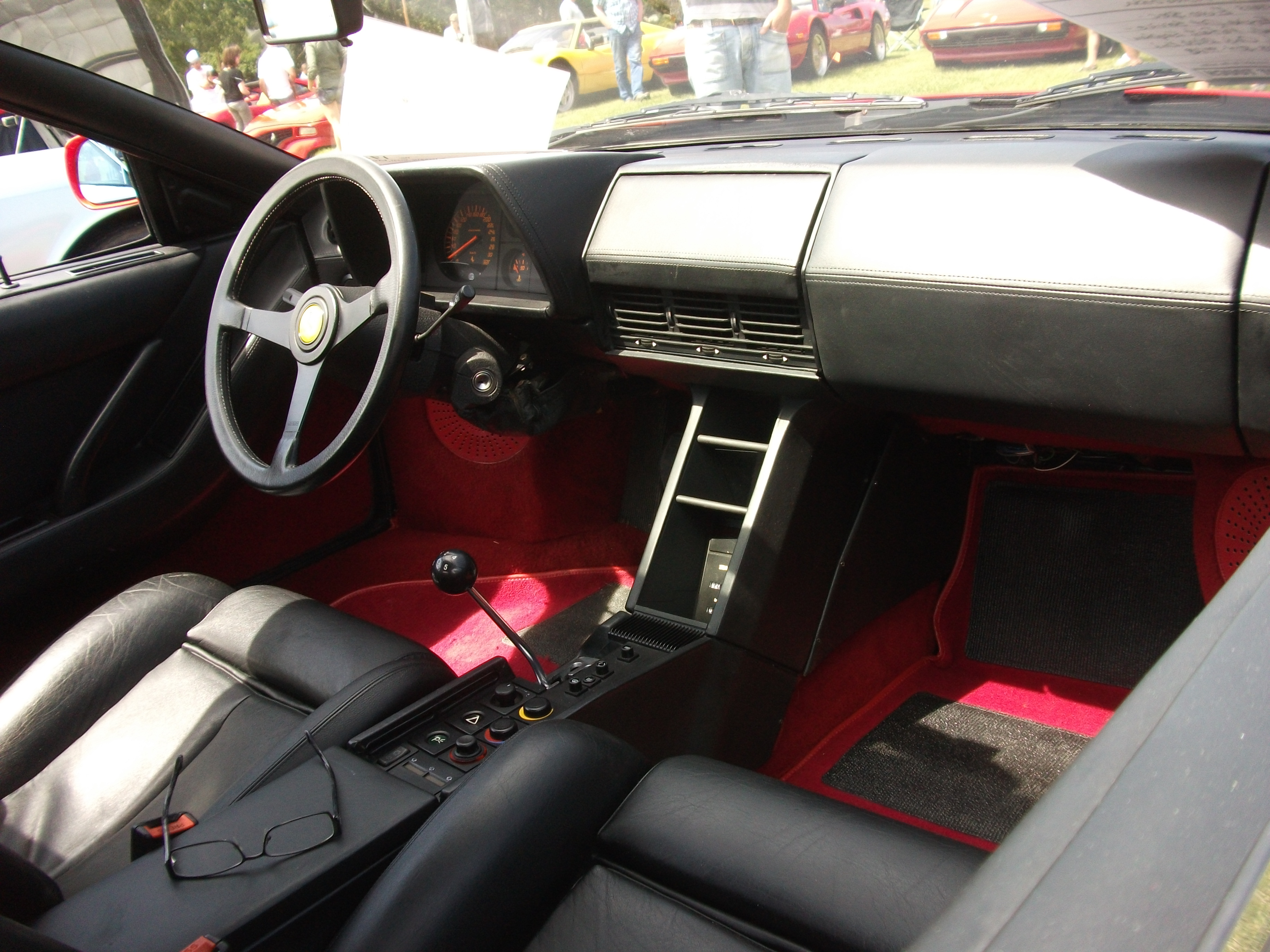 1987 Ferrari Testarossa dash